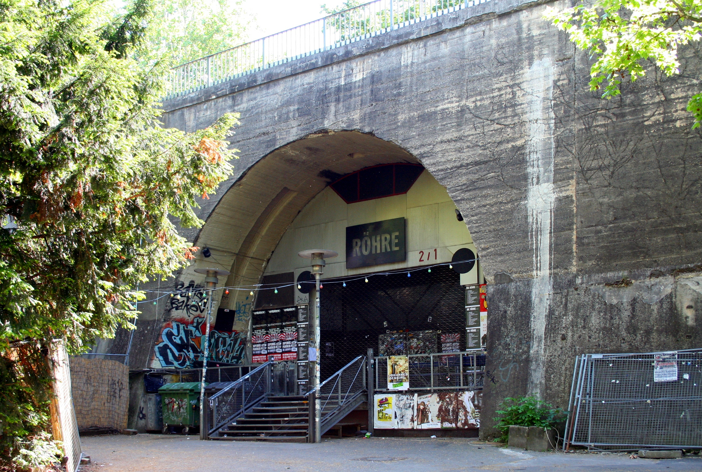 Diskothek die Röhre, Zweite nicht ausgebaute Tunnelröhre des Wagenburgtunnels